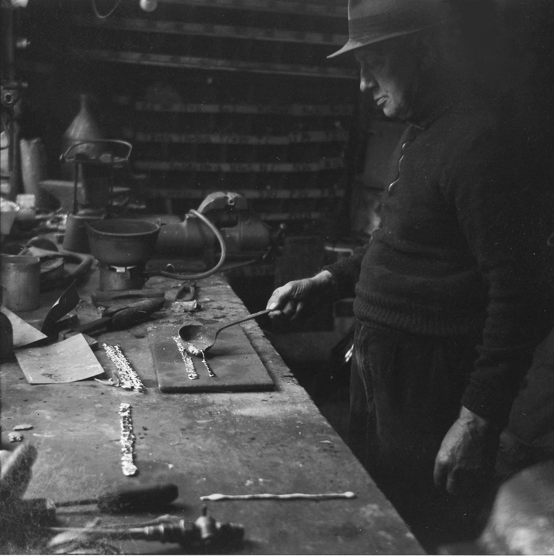 Een loodgieter giet stroken lood. Loodgieter Krijt aan het werk in zijn werkplaats in Zaandam.